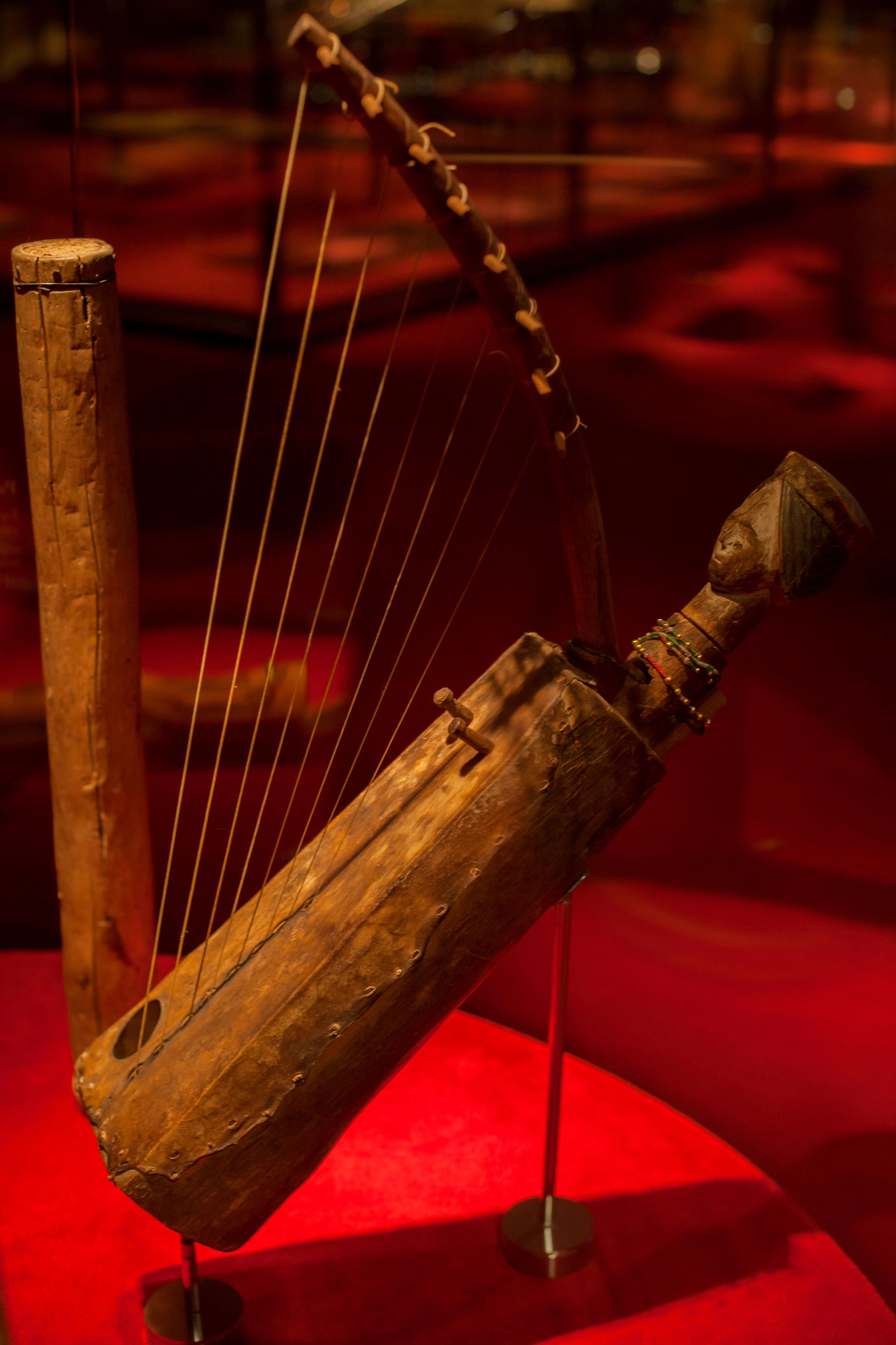 Ngombi, instrument musical africà